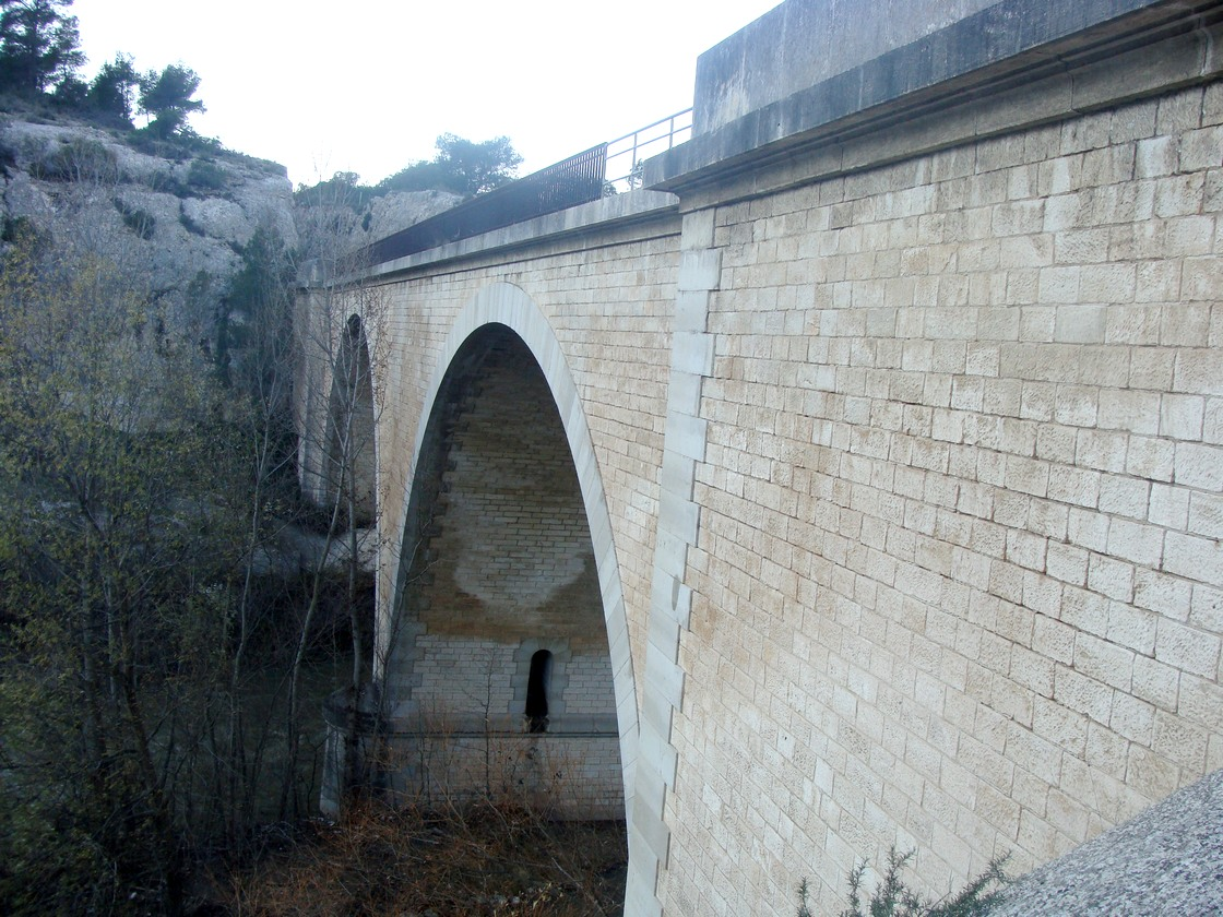 Le Viaduc ferroviaire du Fraissinet, sur l'Arc, à 1 km en aval de Roquefavour.